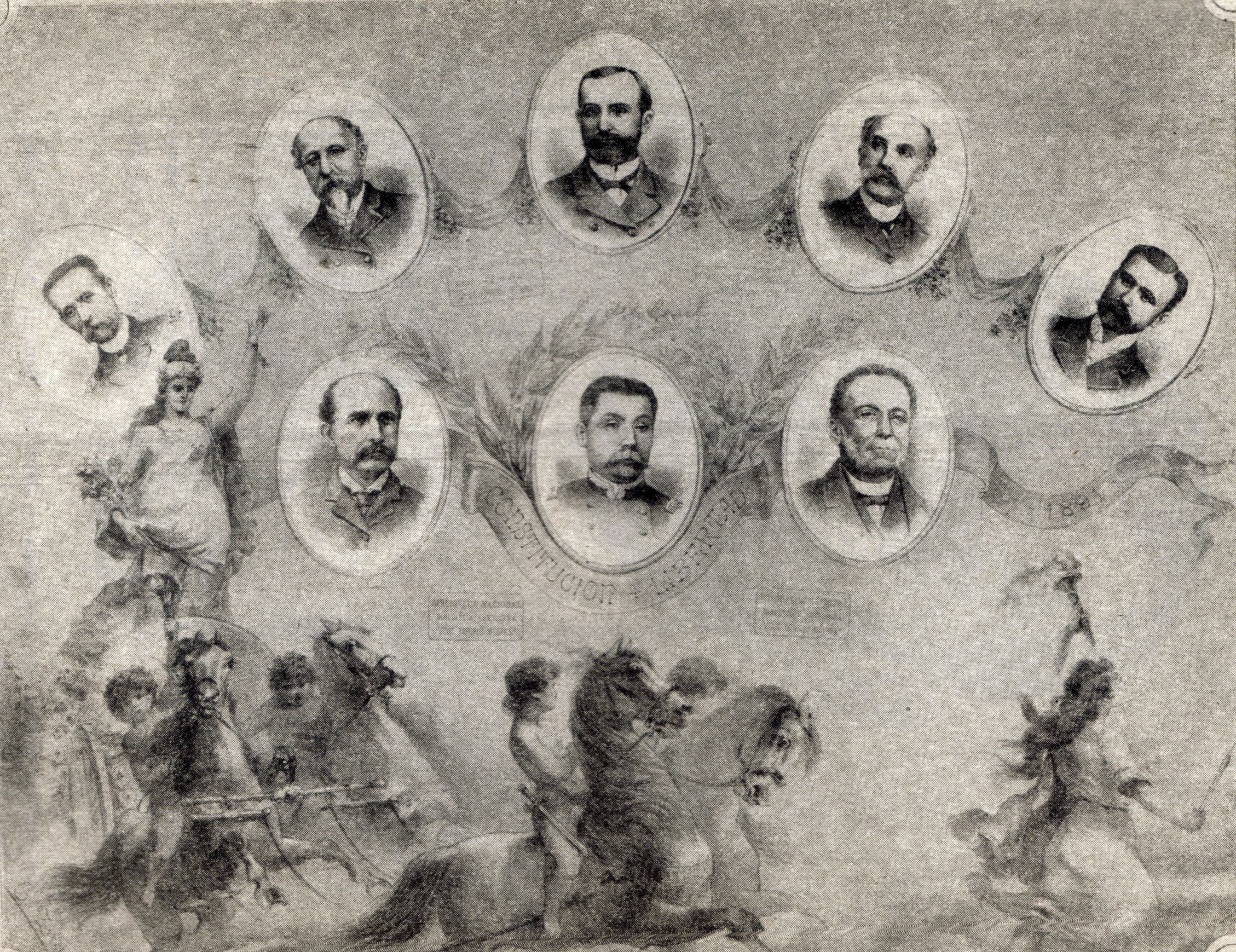 Cuadro Alegorico en homenaje a la Junta de Gobierno de Iquique de 1891. Ministerio y colaboradores. de izquierda a derecha General Adolfo Holley, Ministro de Guerra. Isidoro Errázuriz, Ministro de Justicia e Instrucción Pública; Capitán de Navío Jorge Montt, Presidente de la Junta; Manuel José Irarrázaval, Ministro del Interior; Joaquin Walker Martínez, Ministro de Relaciones Exteriores; Al centro de izquierda a derecha: Ramón Barros Luco, Presidente de la Camara de Diputados; General Estanislao del Canto, a cargo del ejército Constitucional;Waldo Silva Palma, Vicepresidente del Senado